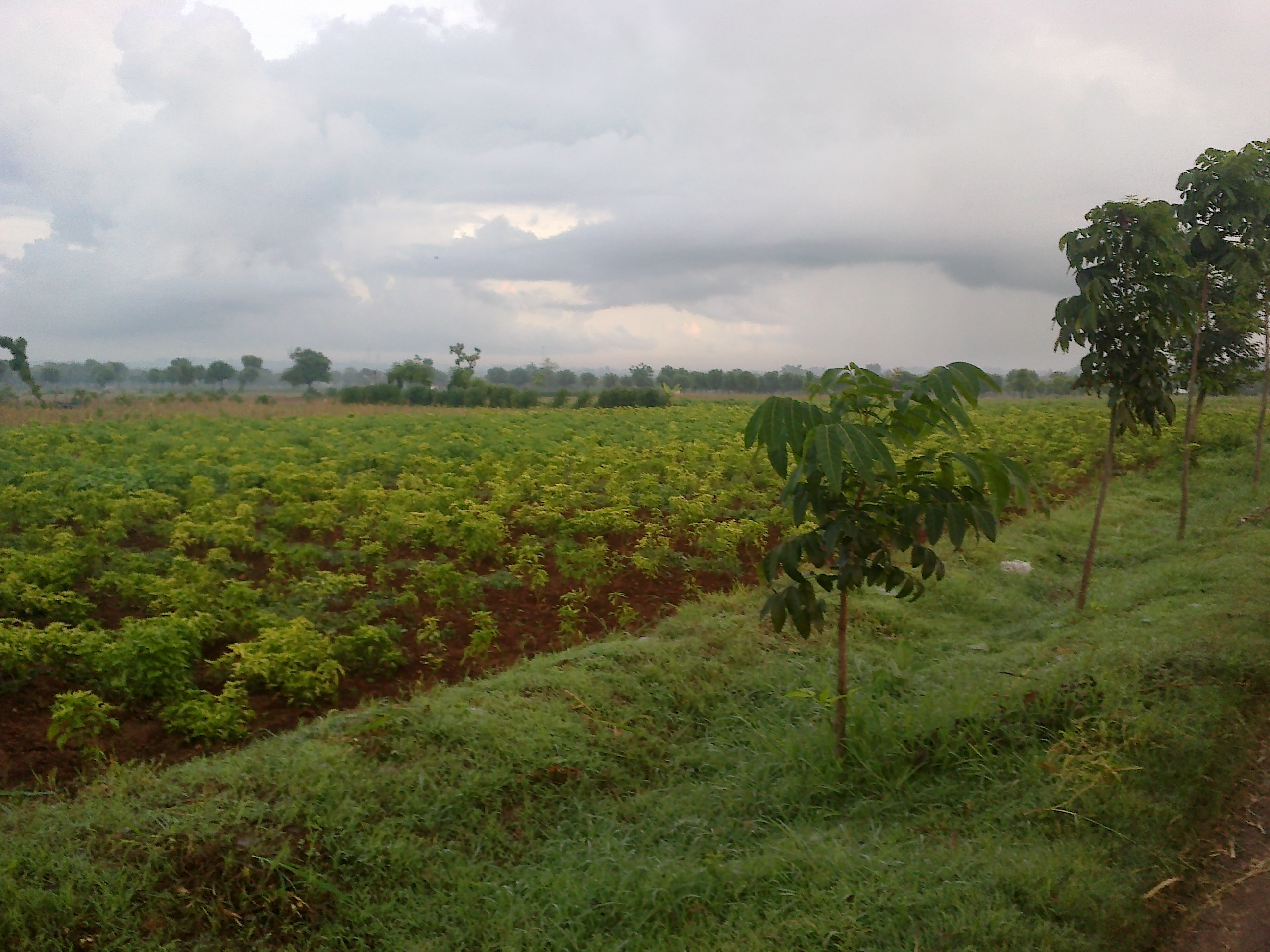 Berbatasan dengan Dukuh Ringin, Desa Wadung